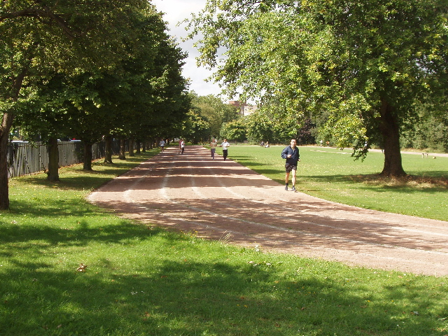 Regent's Park running track